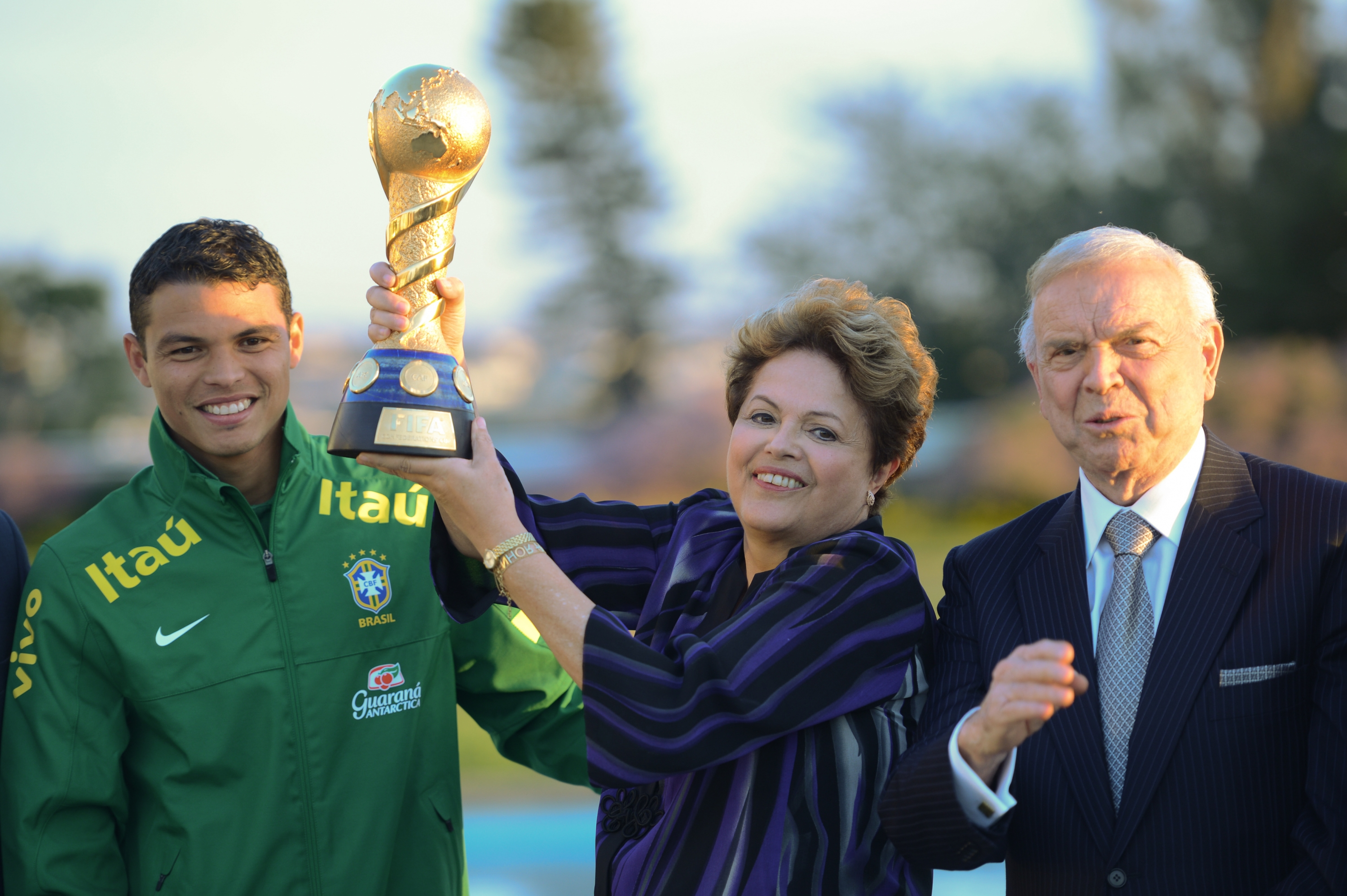 Presidenta Dilma Rousseff recebe Seleção Brasileira de Futebol